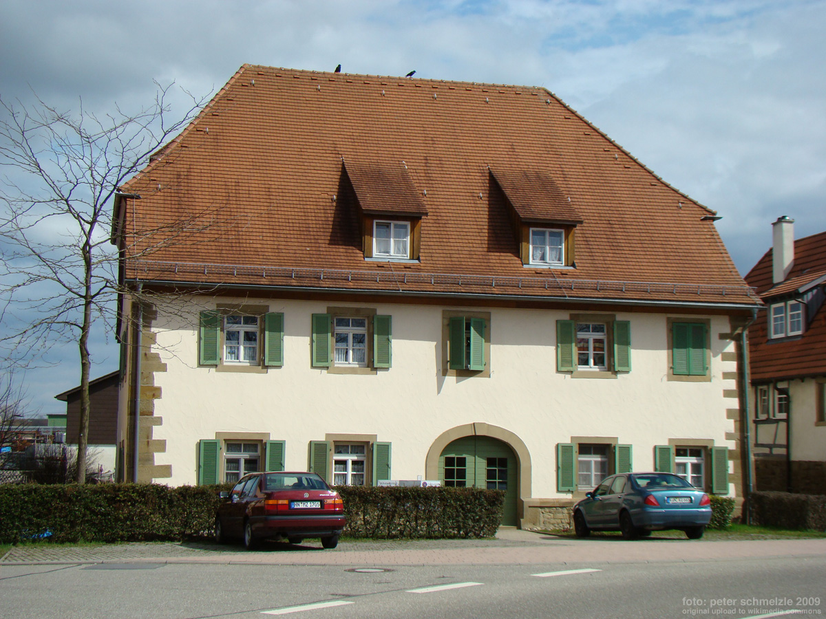 Historisches Gebäude Mühlweg 9 in Eppingen